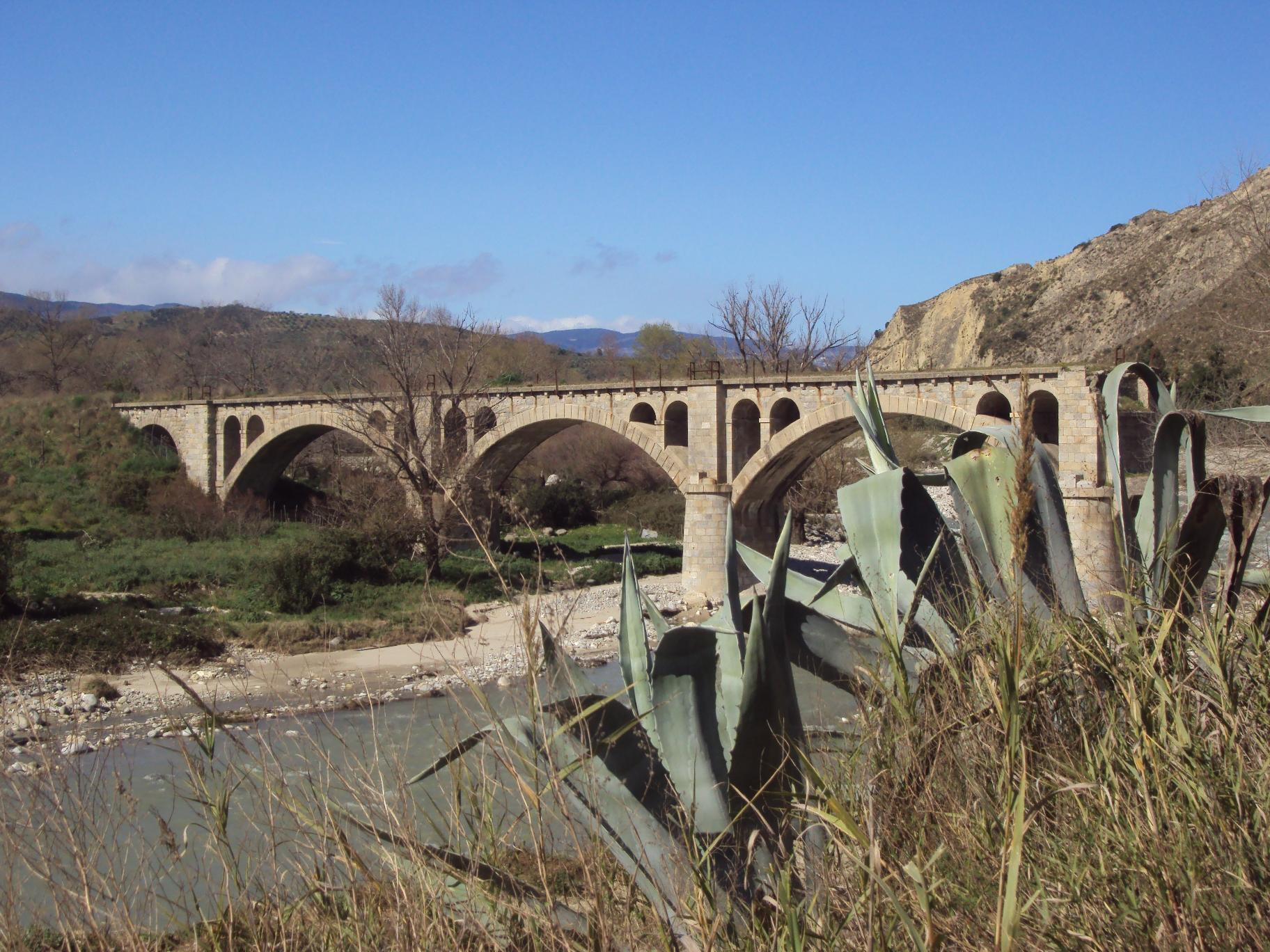 Viadotto sul fiume Tacina della linea dismessa Crotone - Petilia Policastro